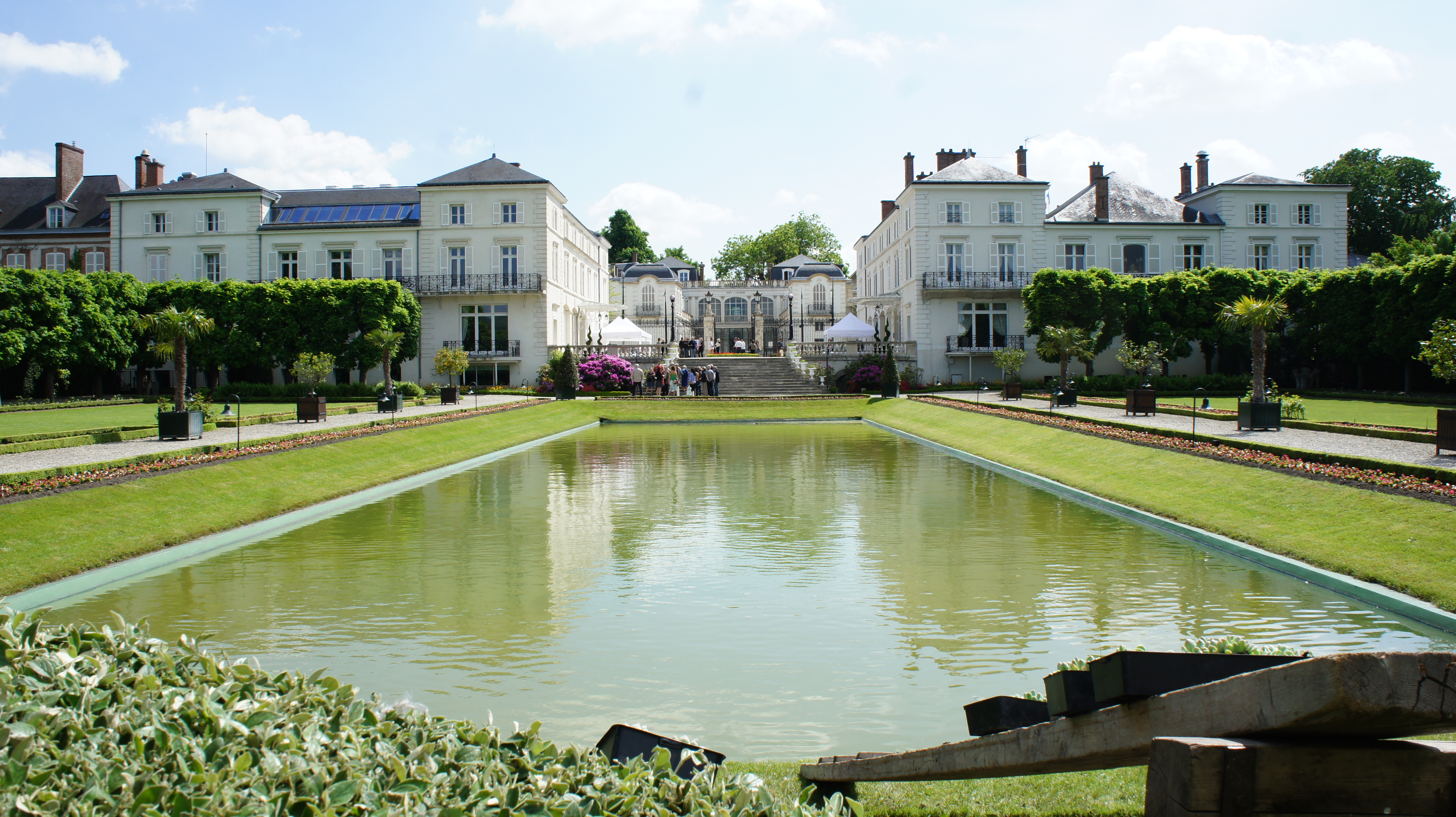 Vue du parc (jardin à la française) et du château Moet & Chandon (château des trois empereurs, ouverture pour la journée des jardins .